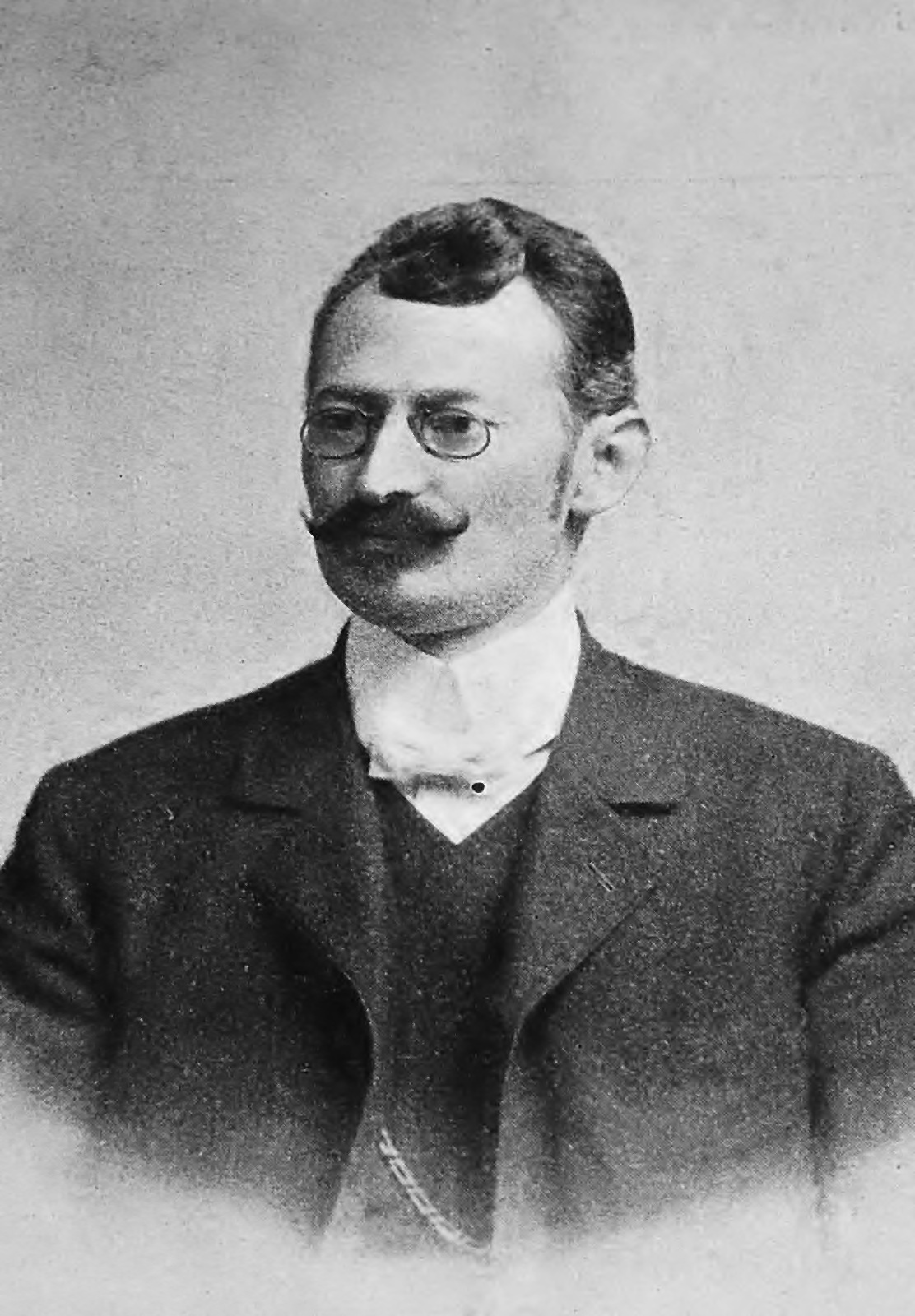 Portrét Jan Červenka